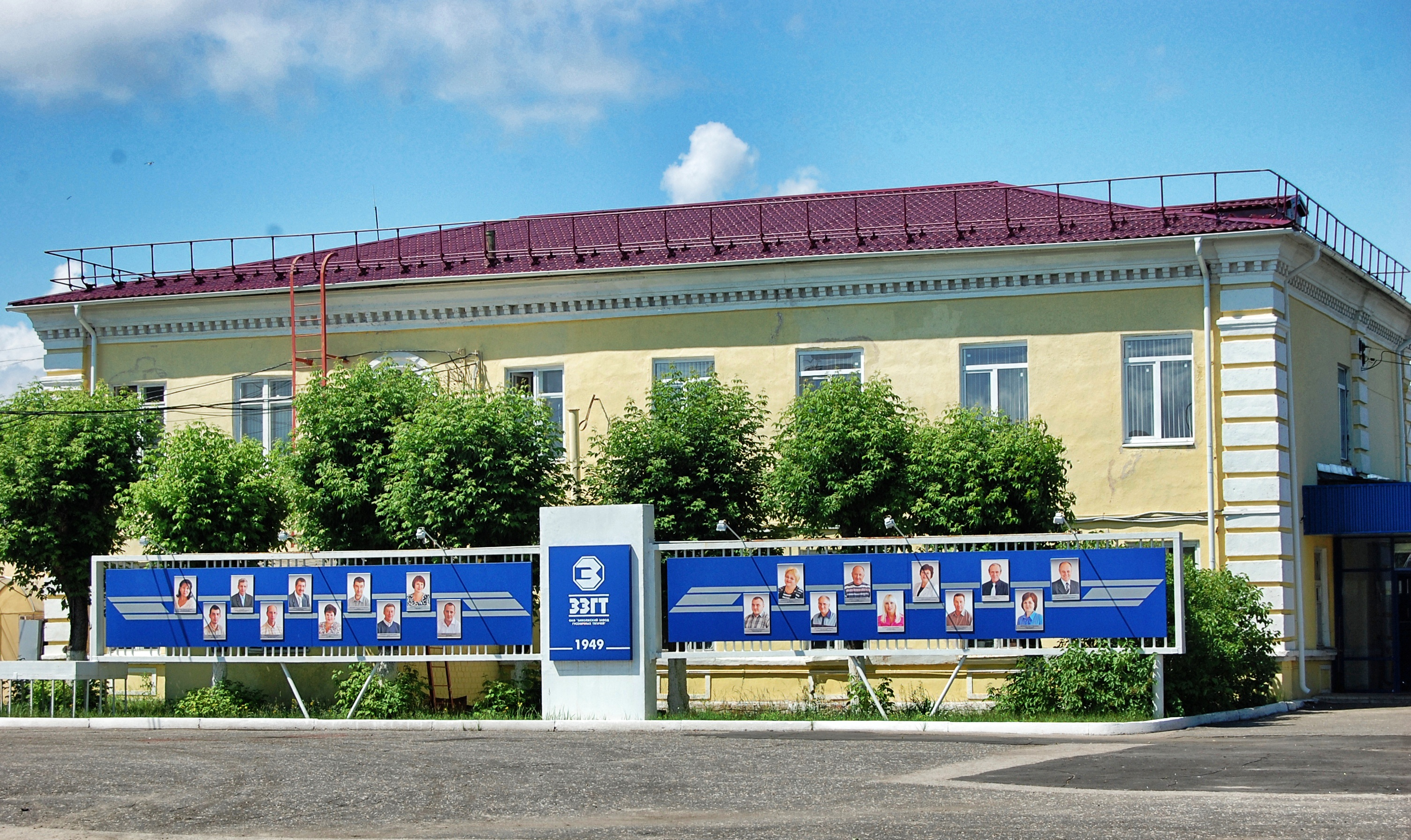 Заводоуправление ЗАО "ЗЗГТ"